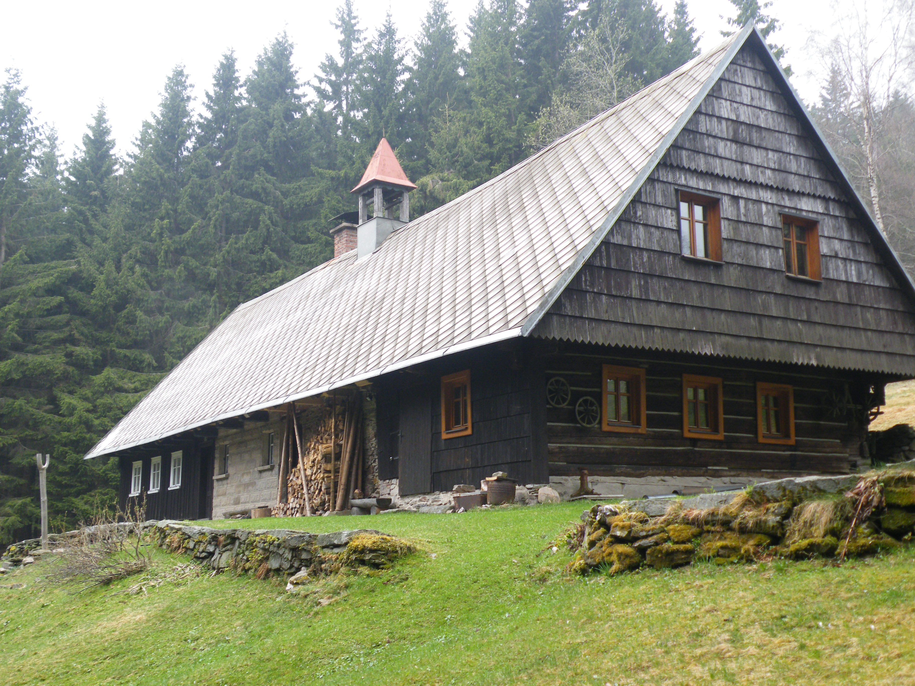 Bouda se zvoničkou na Horních Lysečinách v Krkonoších